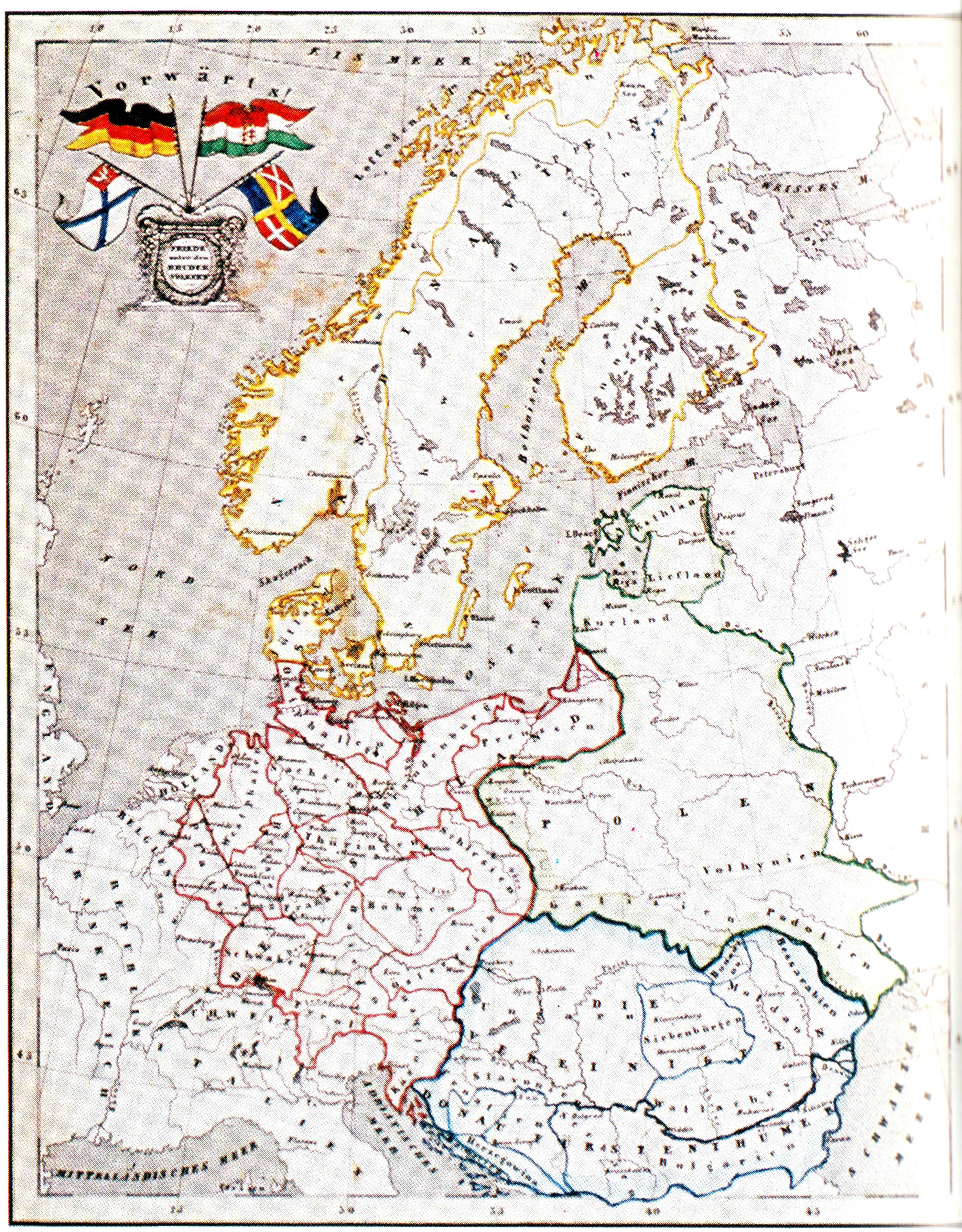 Flugschrift von Philipp Hedwig Kuilb. Europakarte um 1848.